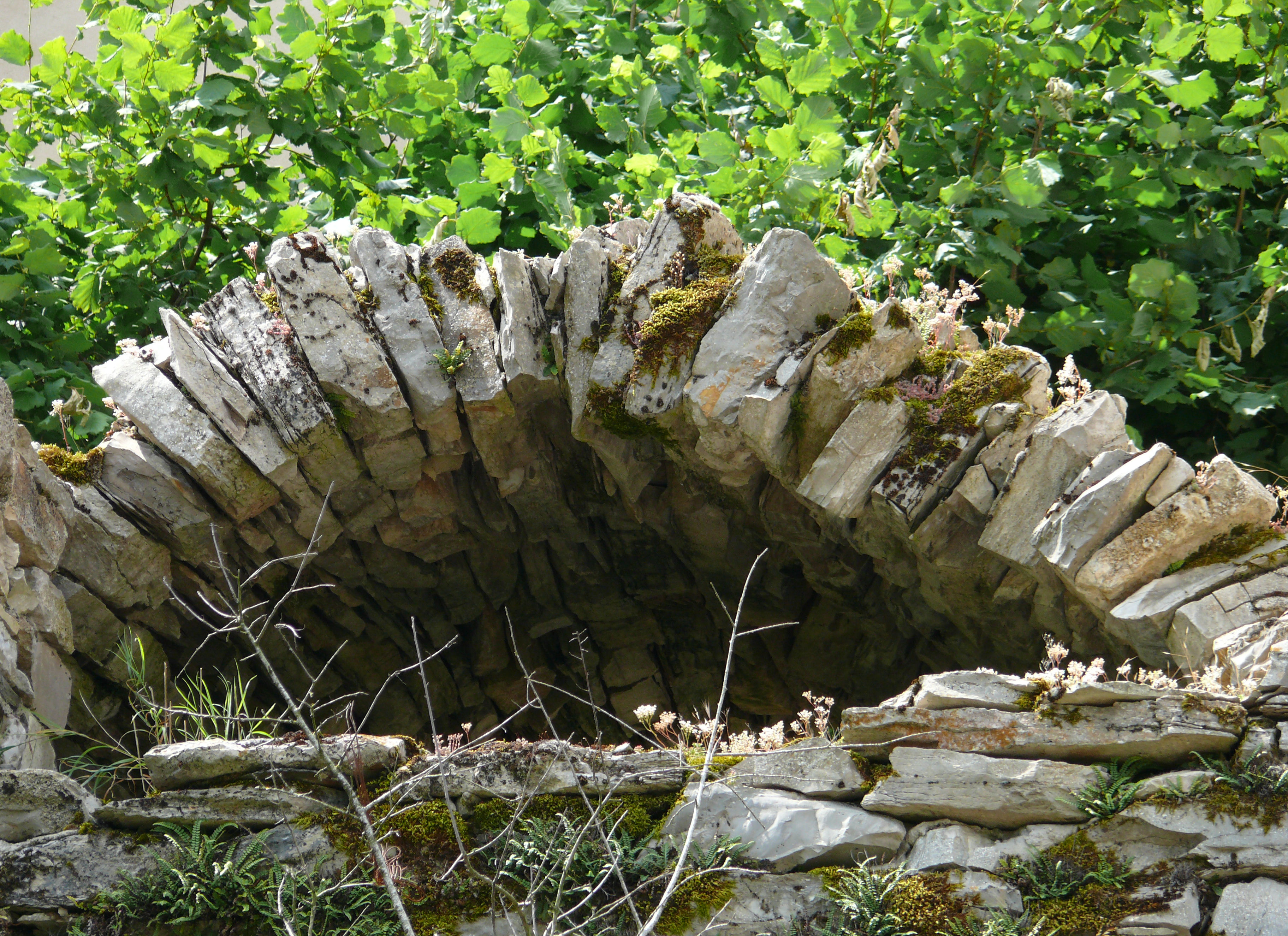 Voûte en pierres sèches d'une cave à Montbrun